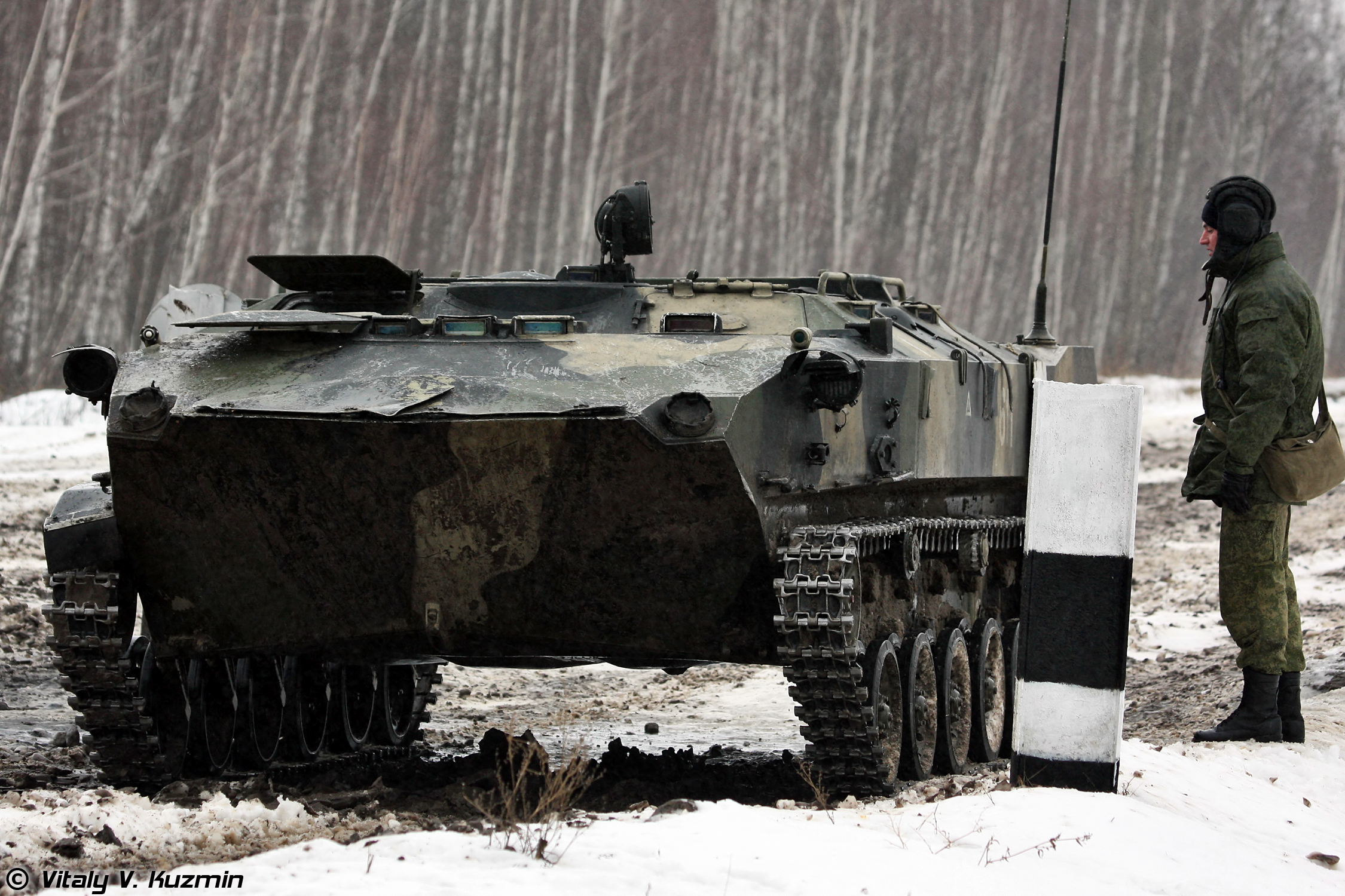 БТР-Д (BTR-D)